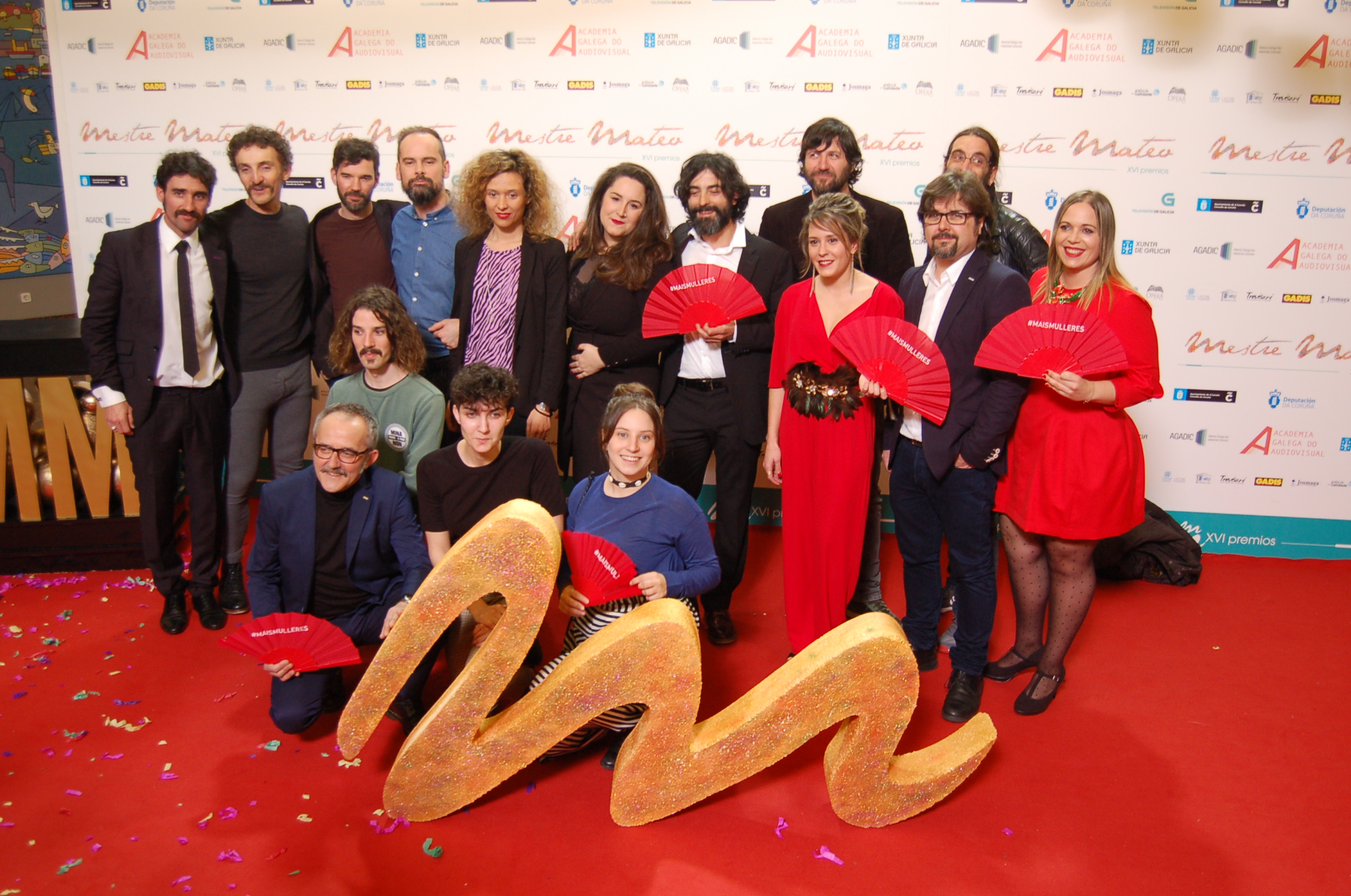 photocall dos Premios Mestre Mateo 2017